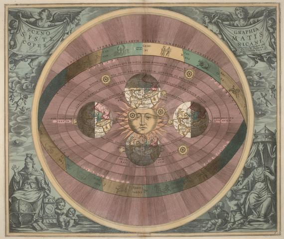 Heliocentric universe, Harmonia Macrocosmica